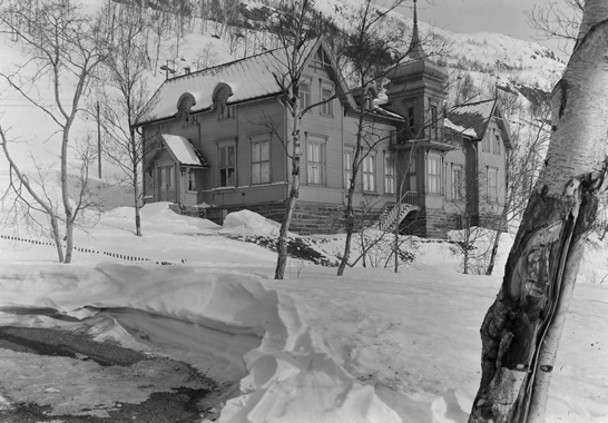 Direktør-, senere direksjonsvilla (representasjonsvilla) til verket, på Furulund i Sulitjelma. Villaen ble flyttet fra Badderen i Nord-Troms. Senere ombygget og i dag en del av Sulitjelma kurs- og hotellsenter. 1920 - 1930 NM.F.008621-00079